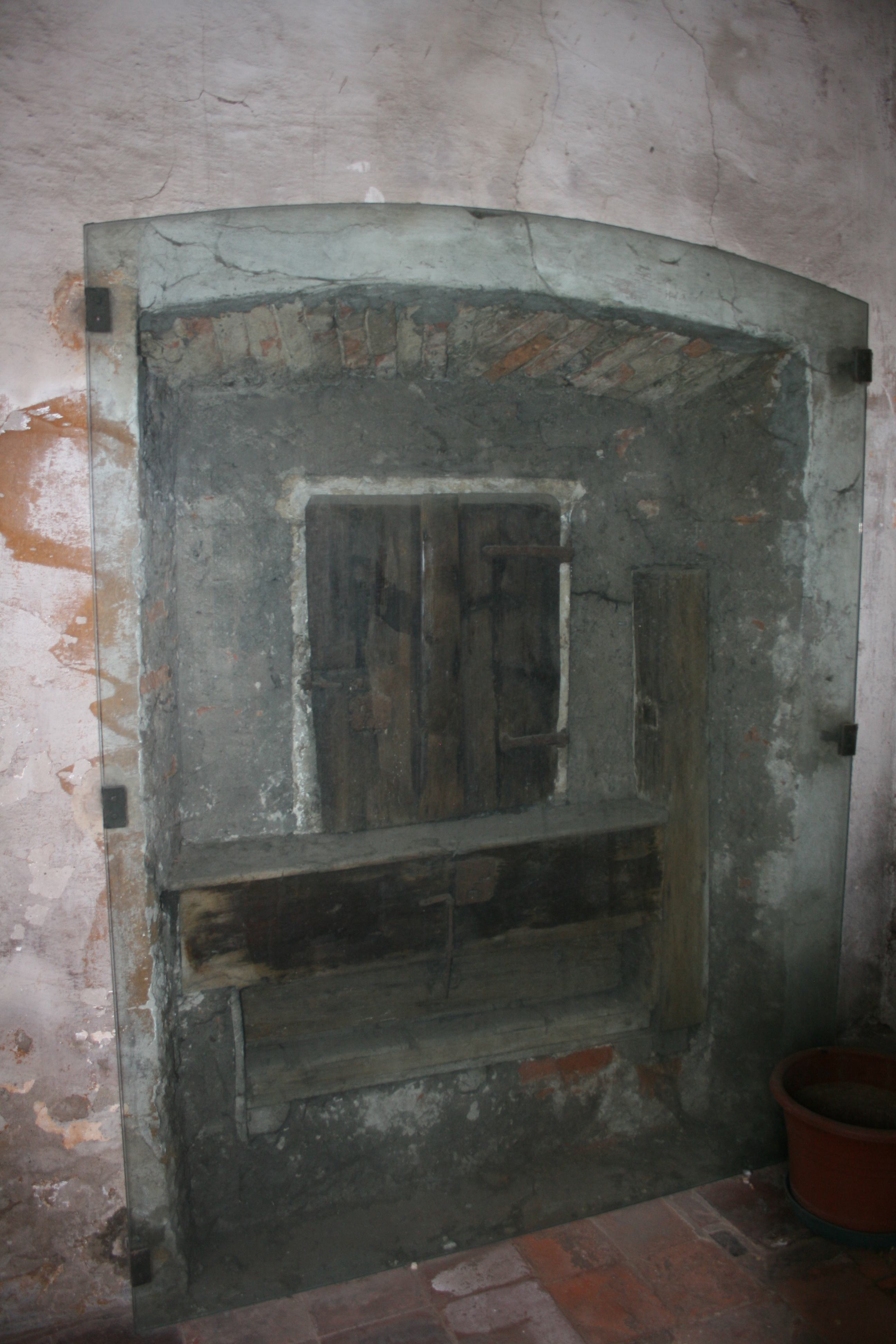 Chiesetta di San Rocco-VI Particolare della ruota dalla parte del chiostro.